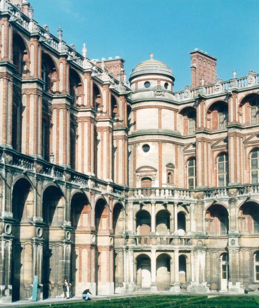 Schloss Saint-Germain-en-Laye, Treppenturm im Innenhof